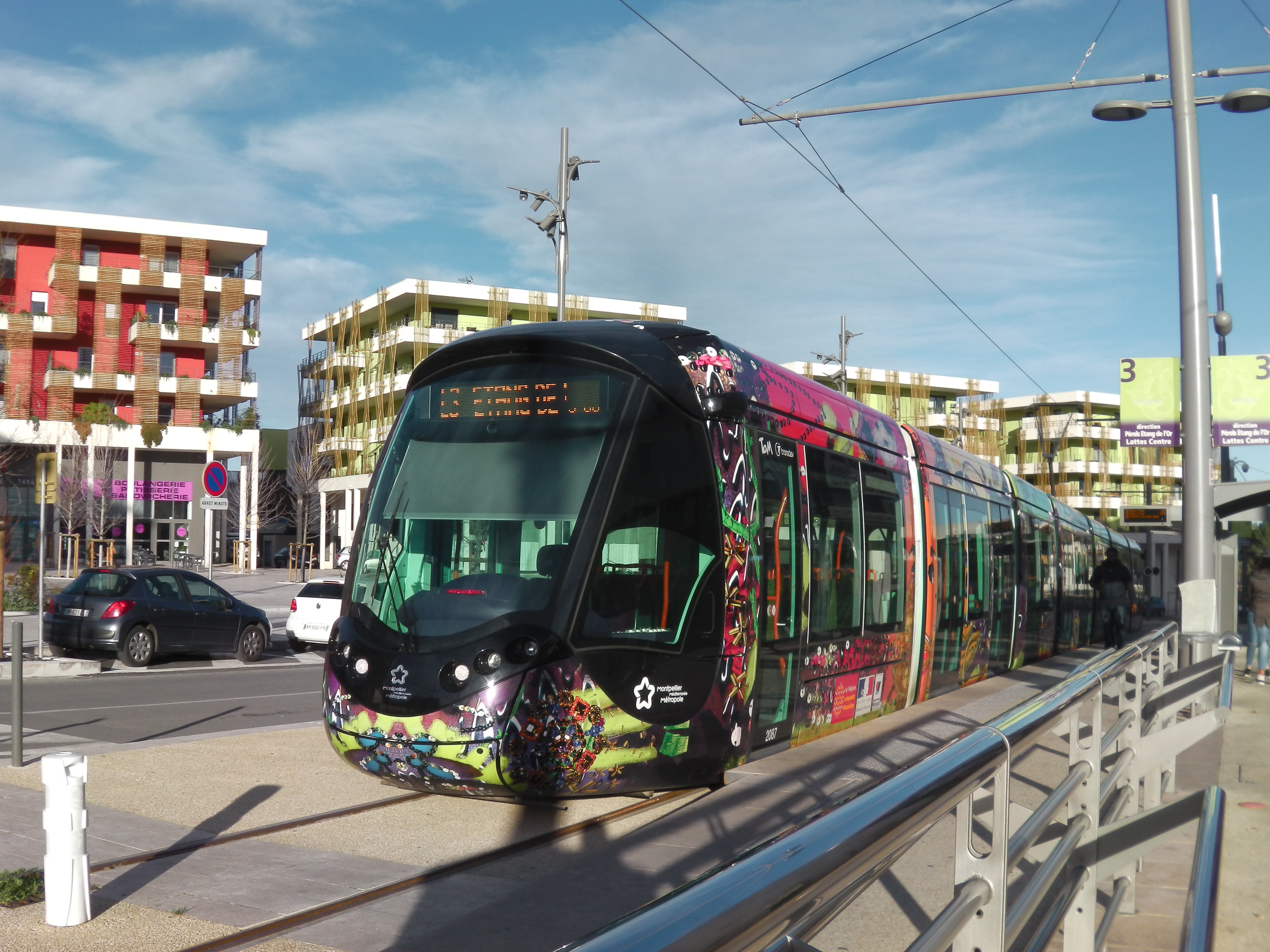 Terminus du Tramway à Juvignac (Hérault)